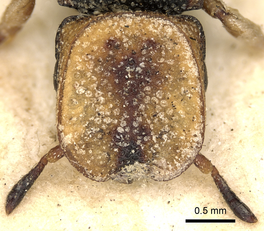 Tête de Cephalotes pallidicephalus. Vue du dessus.